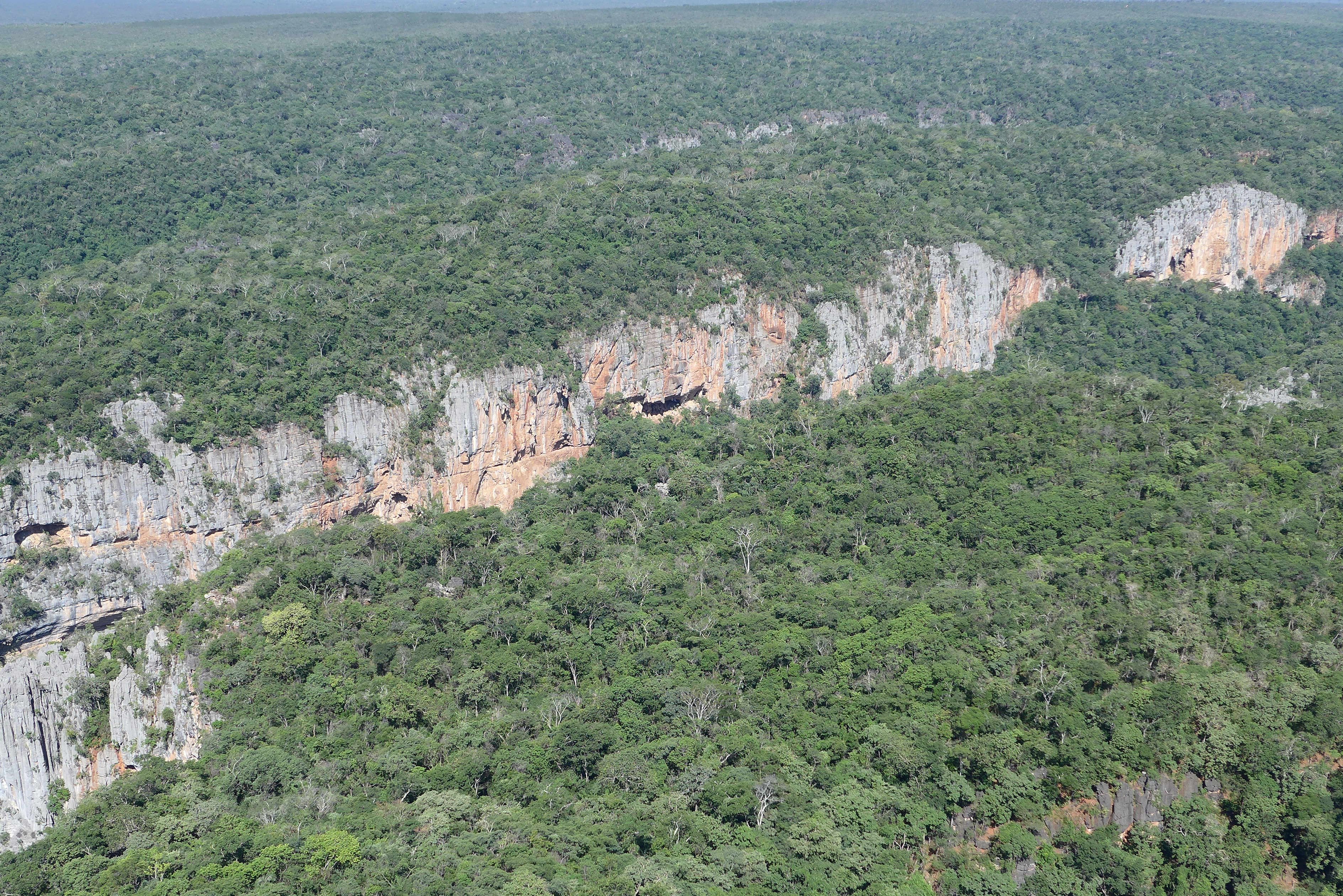 Parque Nacional Cavernas do Peruaçu, vista aérea a partir de um helicóptero